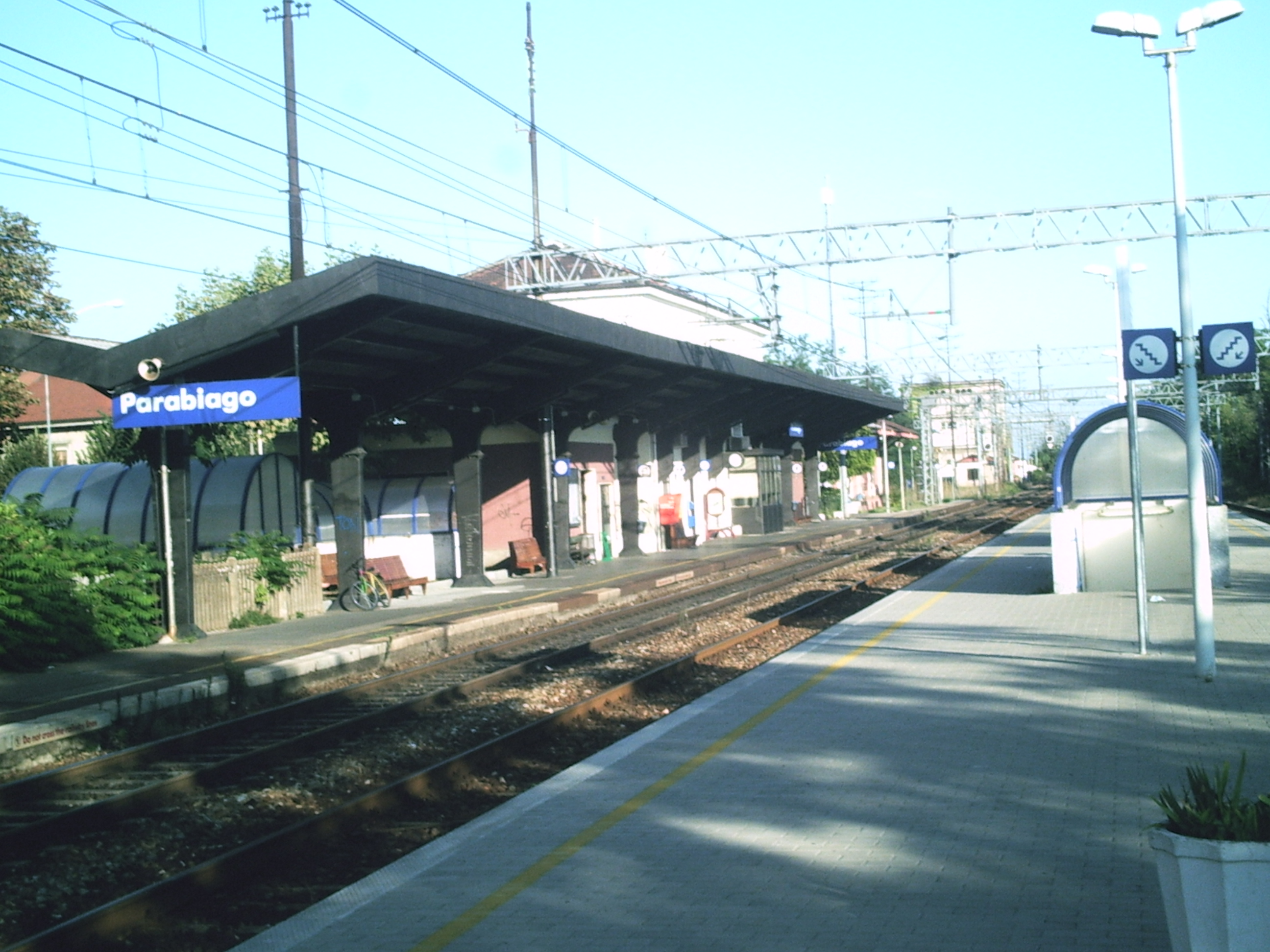 La stazione di Parabiago dalla banchina interna